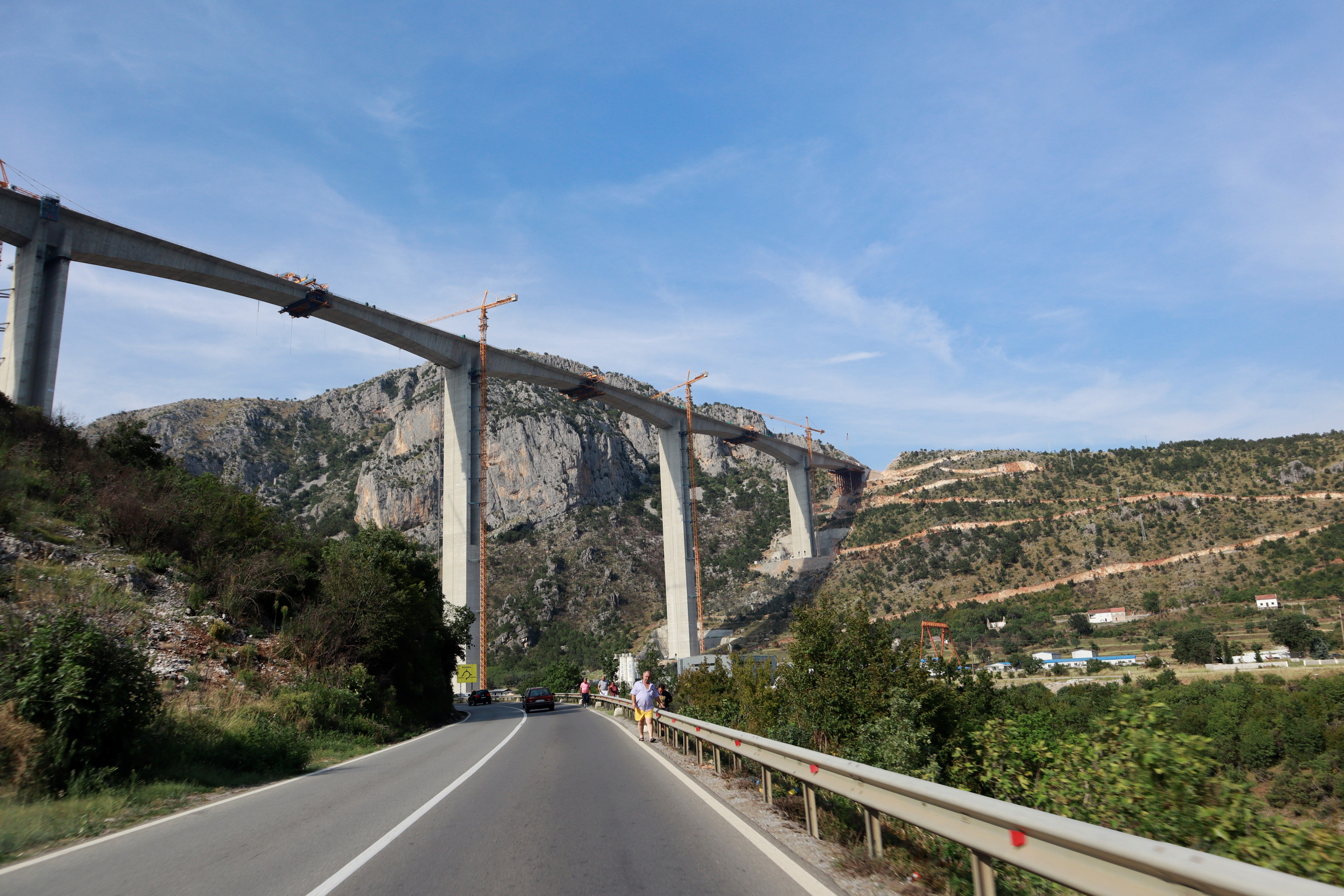 Brueckenbau Montenegro